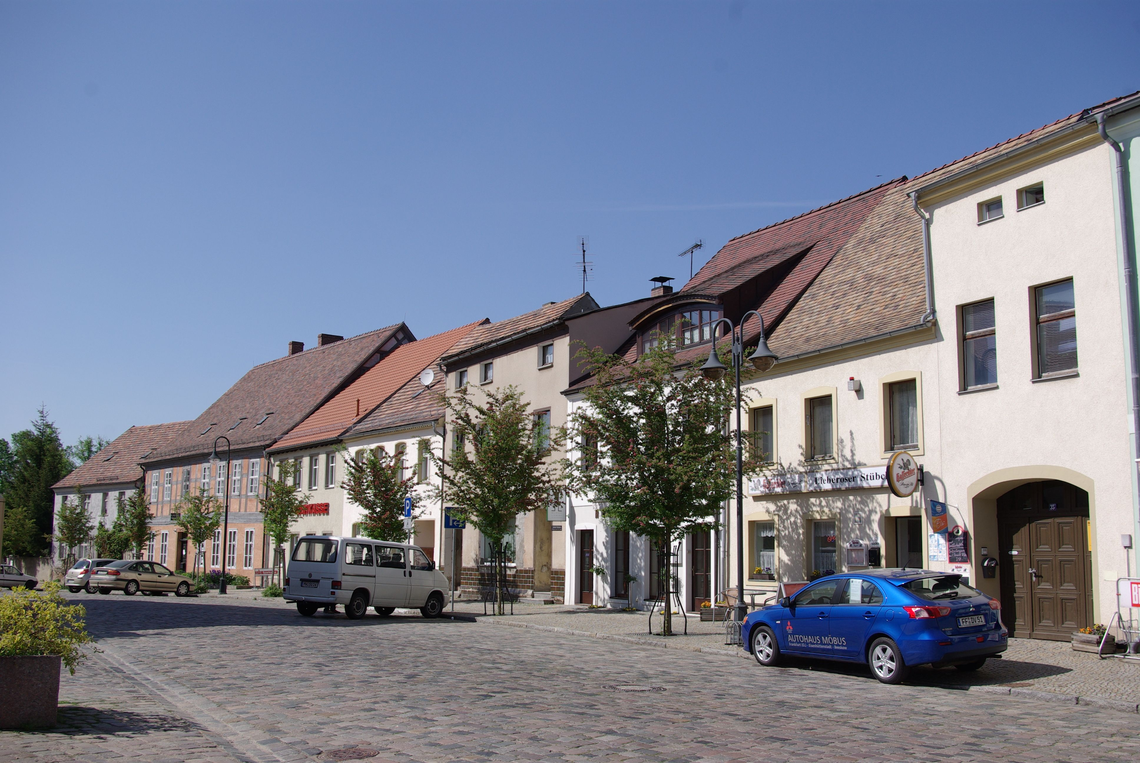 Lieberose in Brandenburg. Der Marktplatz insgesamt steht unter Denkmalschutz. Zu sehen ist die nördliche Seite des Marktes.